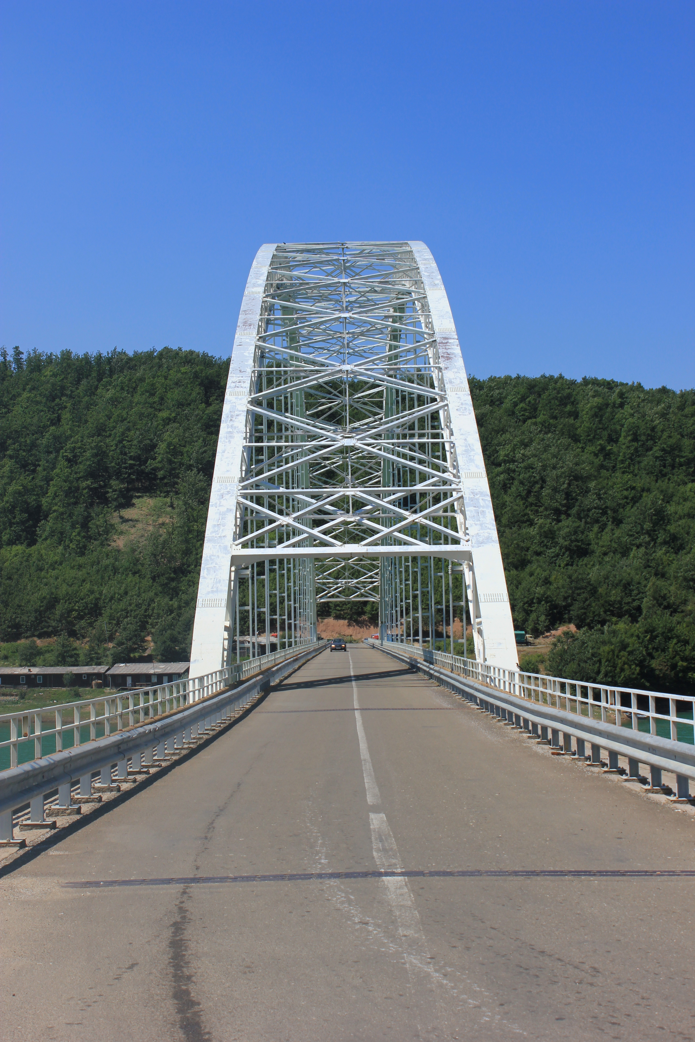 Brücke über den Gazivoda-Stausee an der Grenze zwischen Kosovo und Serbien bei Brnjak.